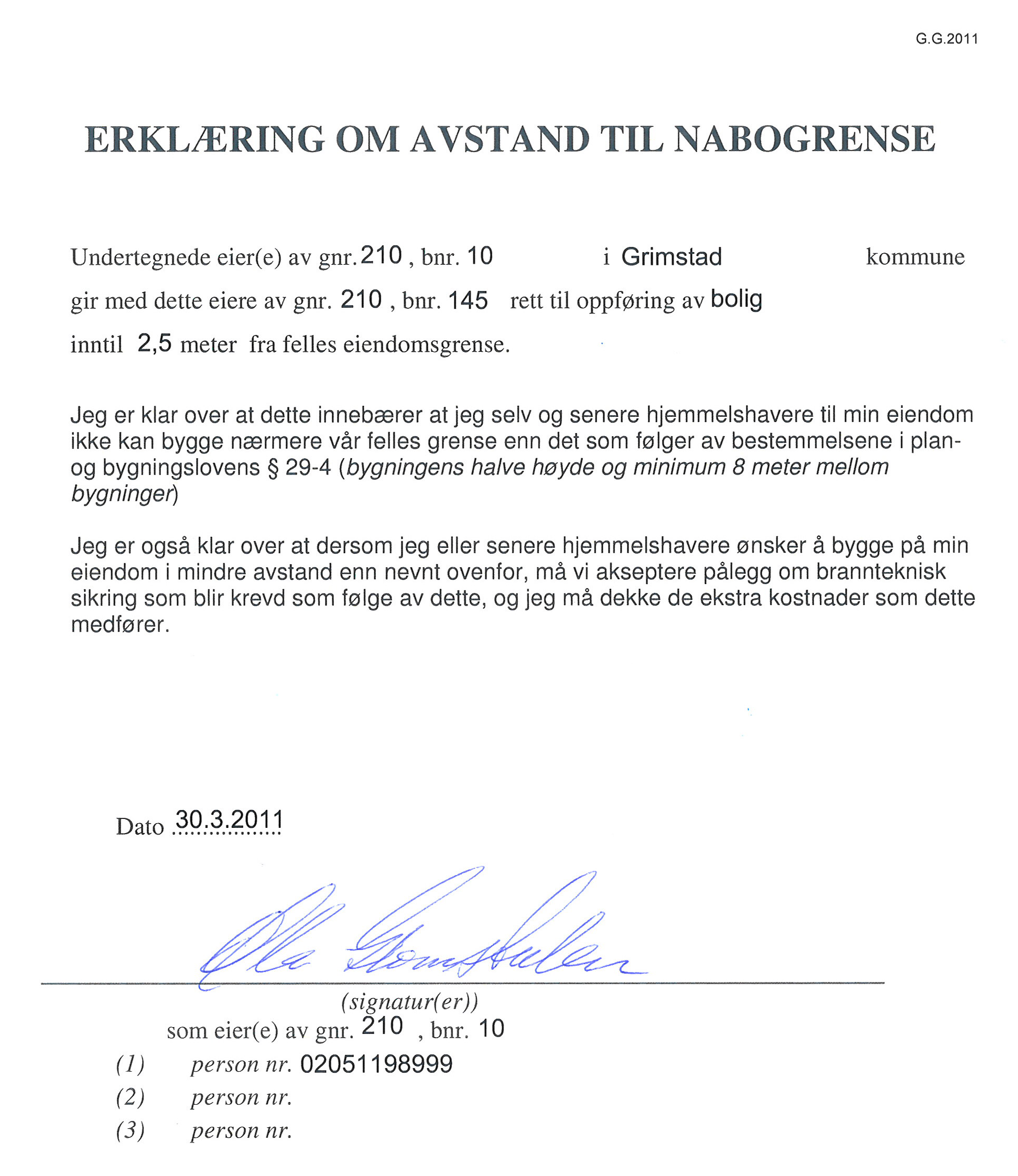 Naboerklæring om byggegrense